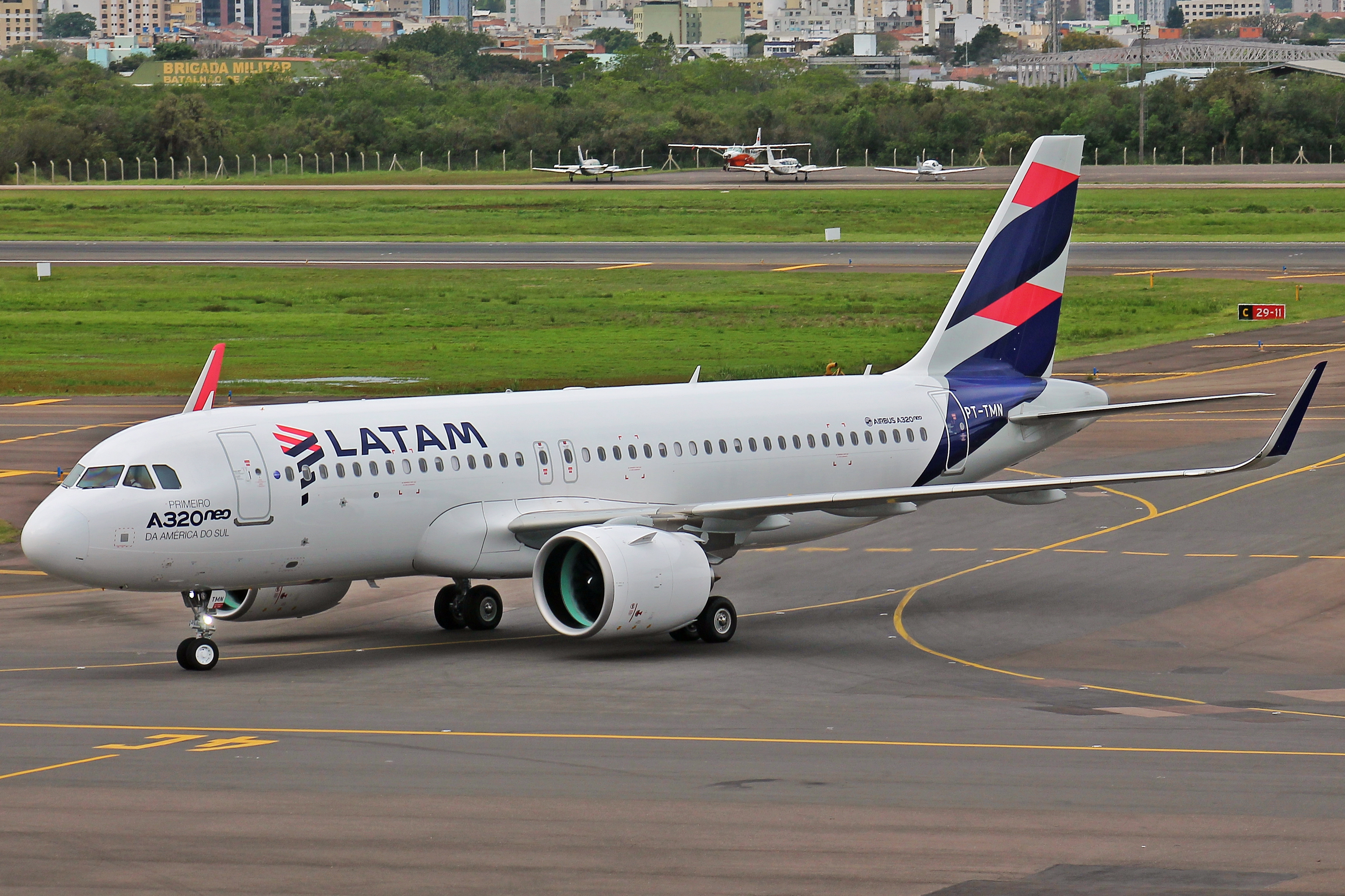 SBPA